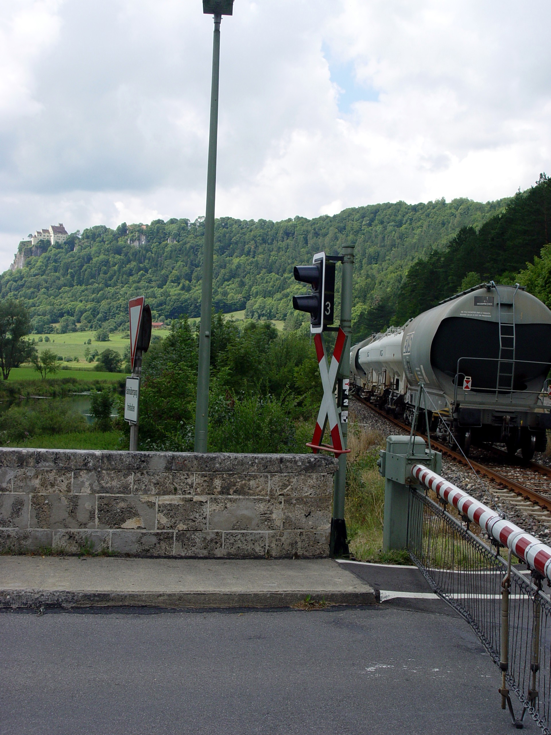 Güterzug auf der Donautalbahn in Hausen im Tal, im Hintergrund die Burg Werenwag